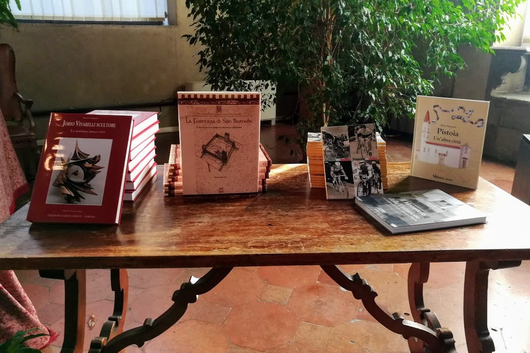 Premiazione dei vincitori Wiki Loves Monuments Toscana 2018 a Pistoia.